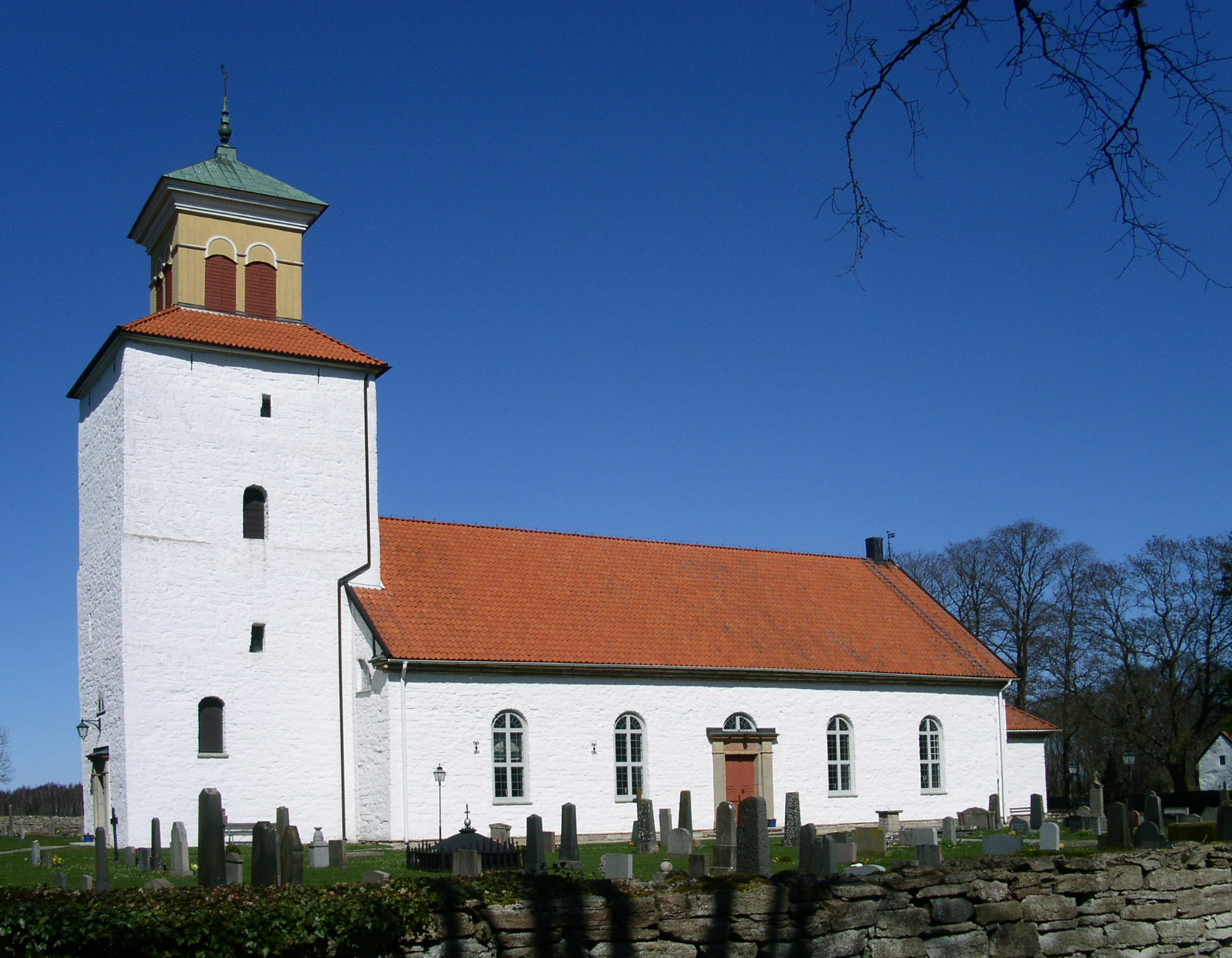 Löts kyrka